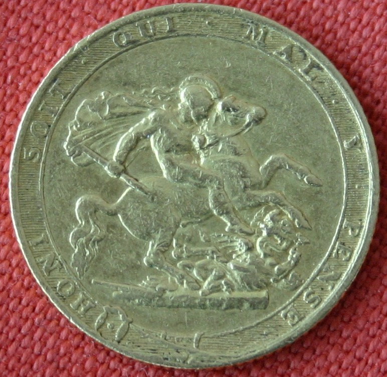 Revers Souvreign von 1817